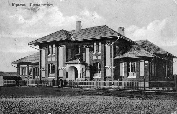 MuuseumikoguFotokogu OlemuspostkaartOriginaaloriginaalSäilivusheaEraldatavad osadMaterjal paber (9x12cm) tekst objektil Saadetud Pärnusse; Pärnu postitempel daatumiga 12.12.14.